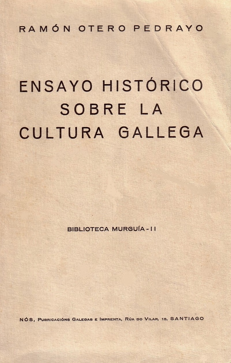 Ensayo histórico sobre la cultura galega